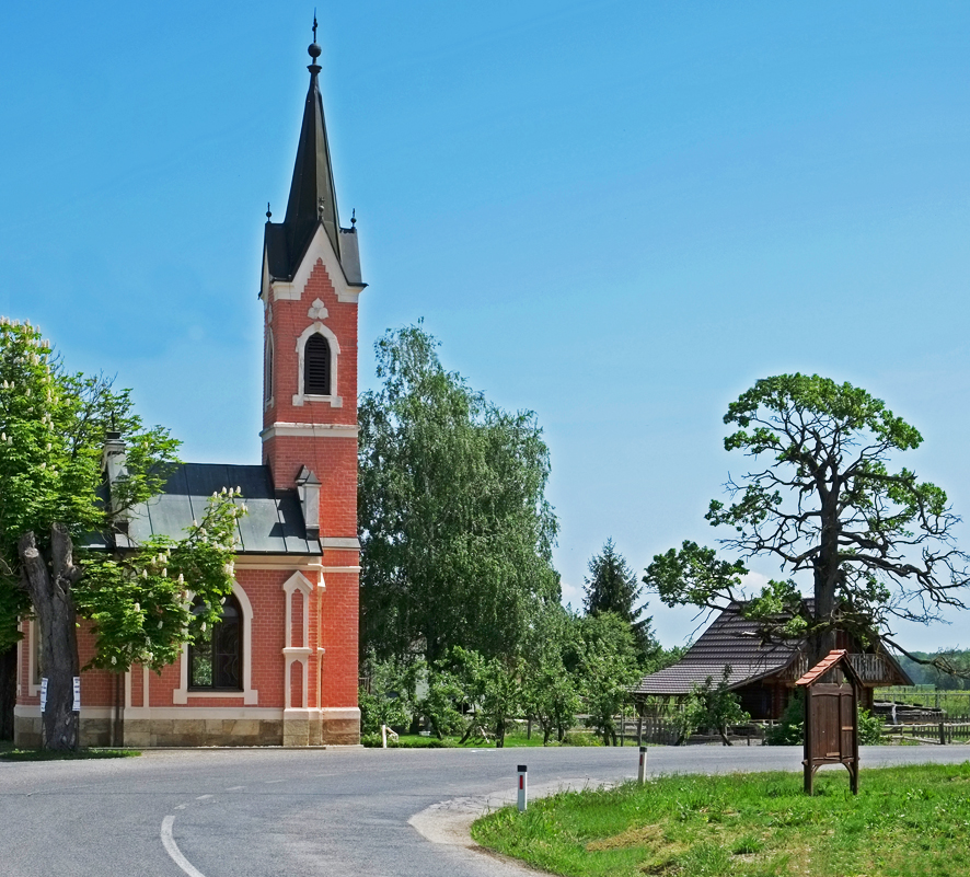 Dreifaltigkeitskapelle in Skakovci, Slowenien